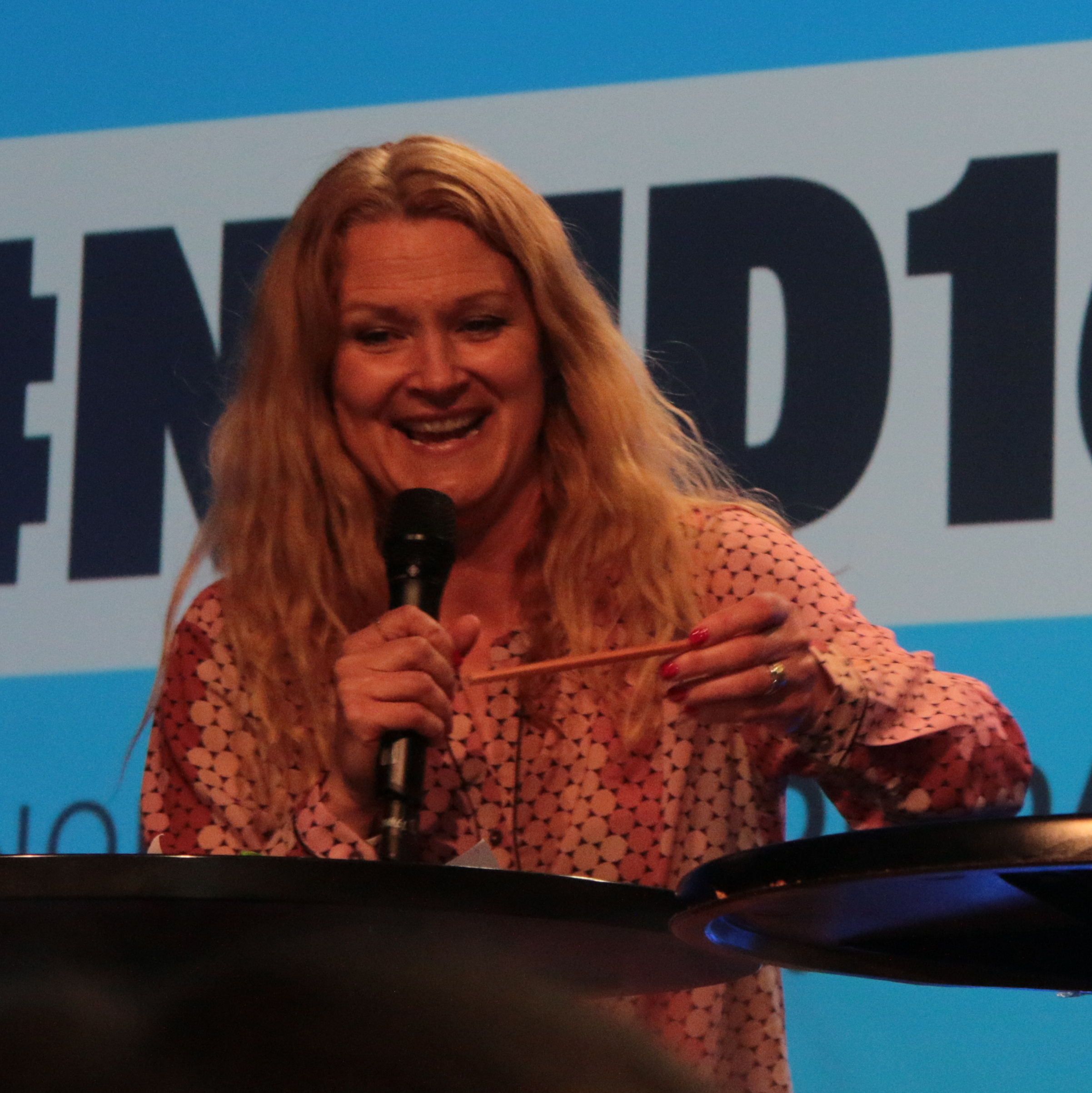 Medvirkende: Berit Boman (Regissør og produsent), Per Hustad (Regissør og produsent), Sandra Hafsahl (Produsent, Monster Entertainment), Kristian Westgaard (Daglig leder, Mexiko) Moderator: Anette With (Planleggingssjef, TV 2 )